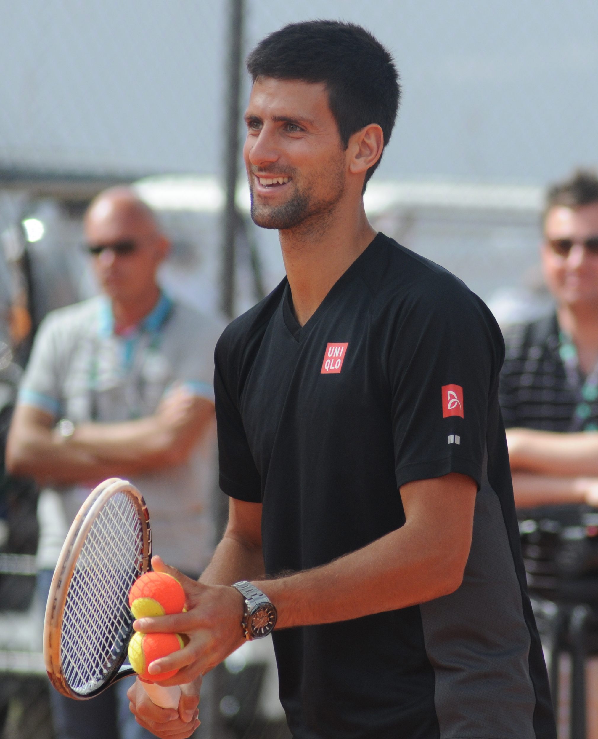 Novak Đoković at the 2014 Internazionali BNL d'Italia